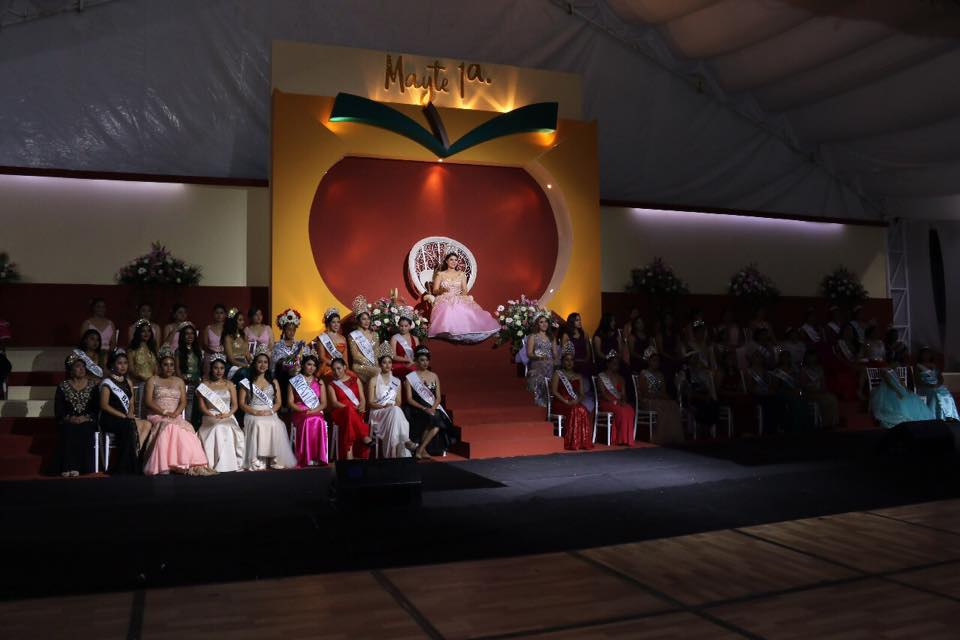 Reina de la Feria de la manzana de Zacatlán, 2017